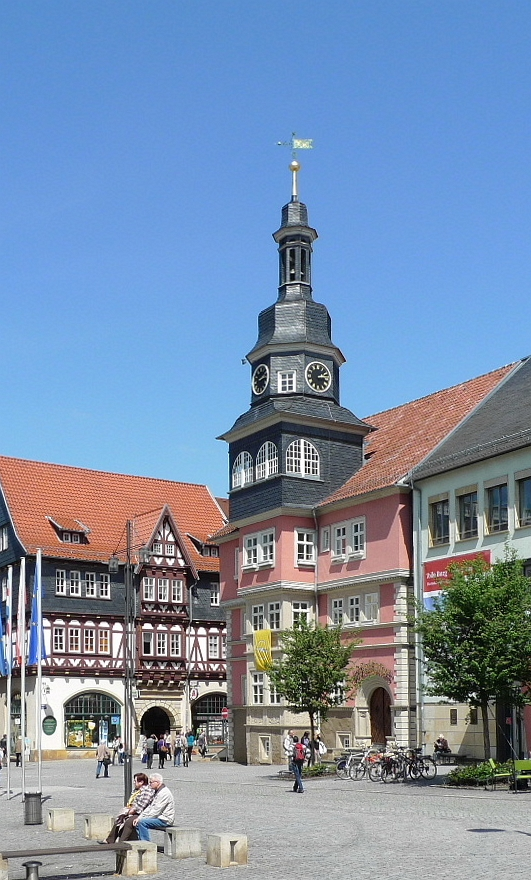 Eisenach - Markt, Ratsapotheke und Rathaus